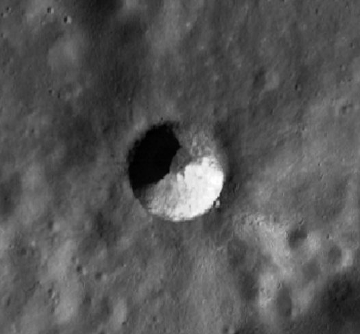 Cráter satélite Buch B. (Imagen LRO)